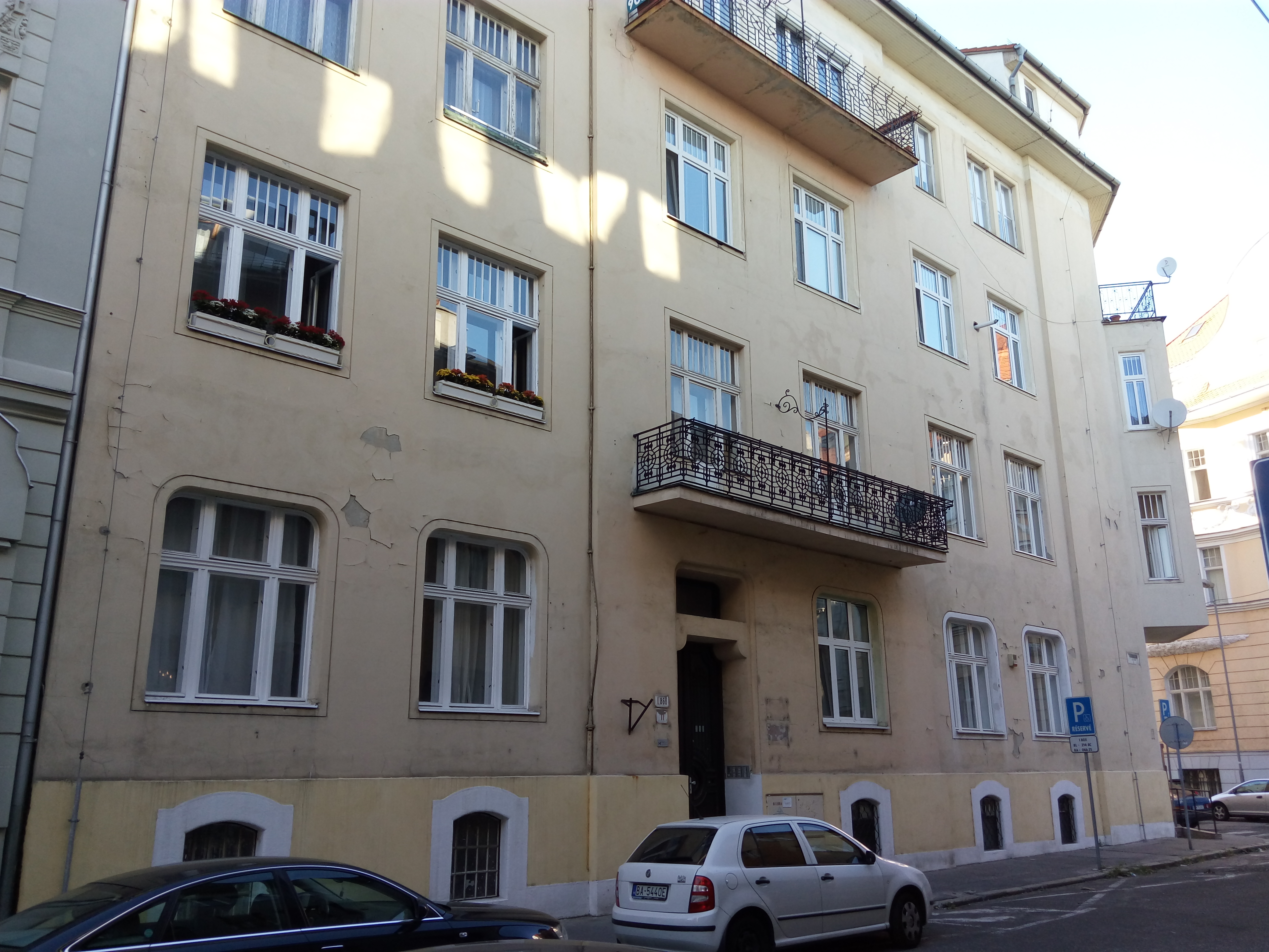 Sládkovičova 11, Staré Mesto, Bratislava